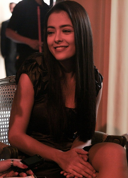 Li Martins, ex-Rouge, em 2009.